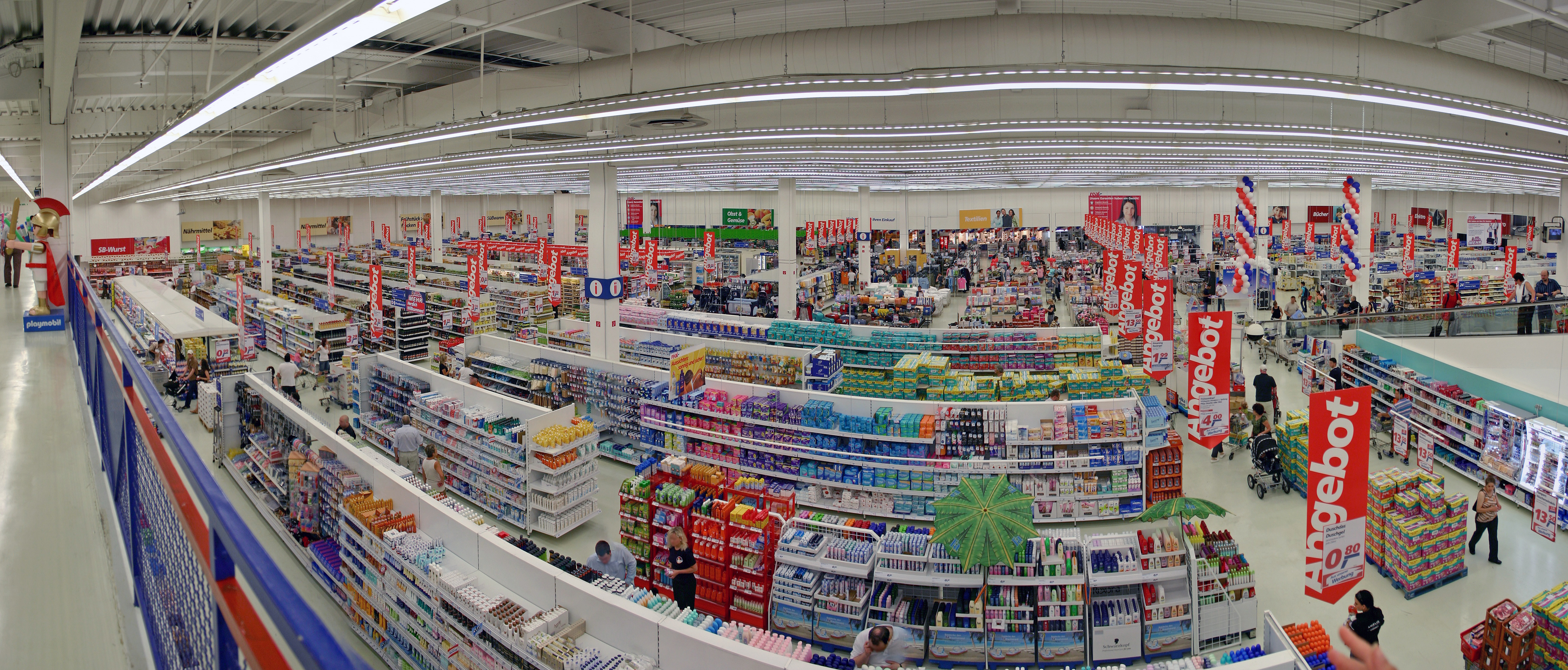 Neu eröffnete real,- Filiale in Würzburg, vormals WalMart